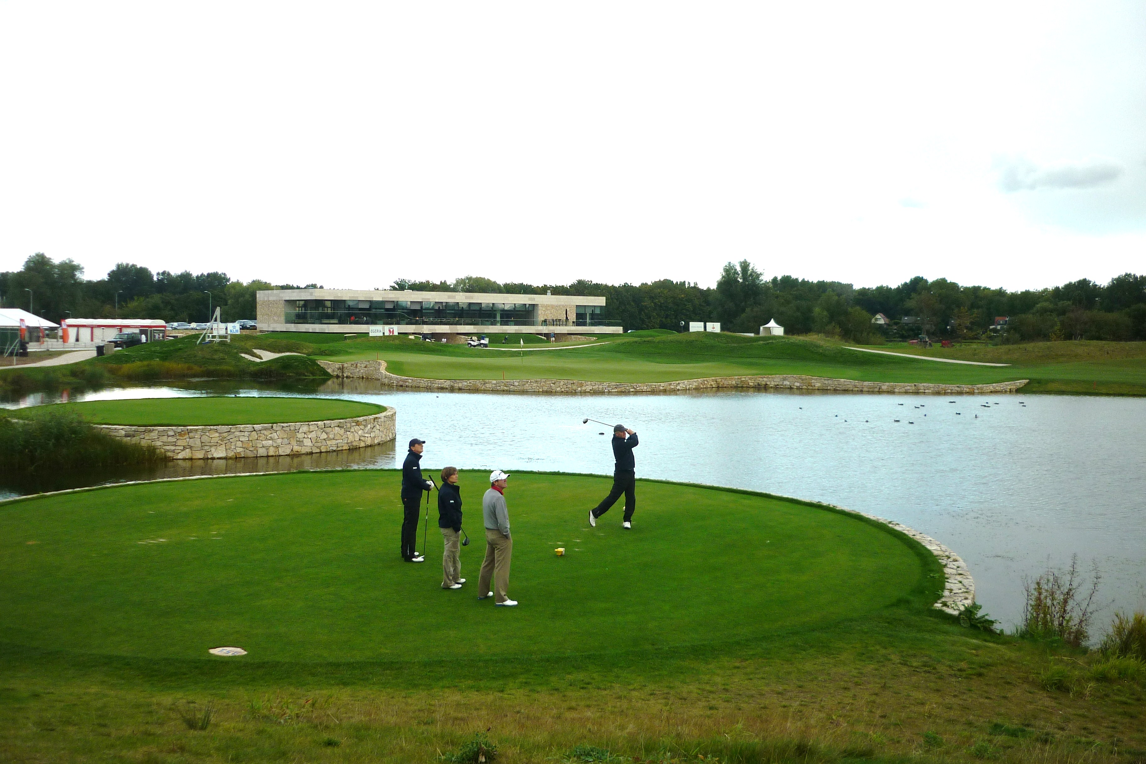 The International, Tee 10